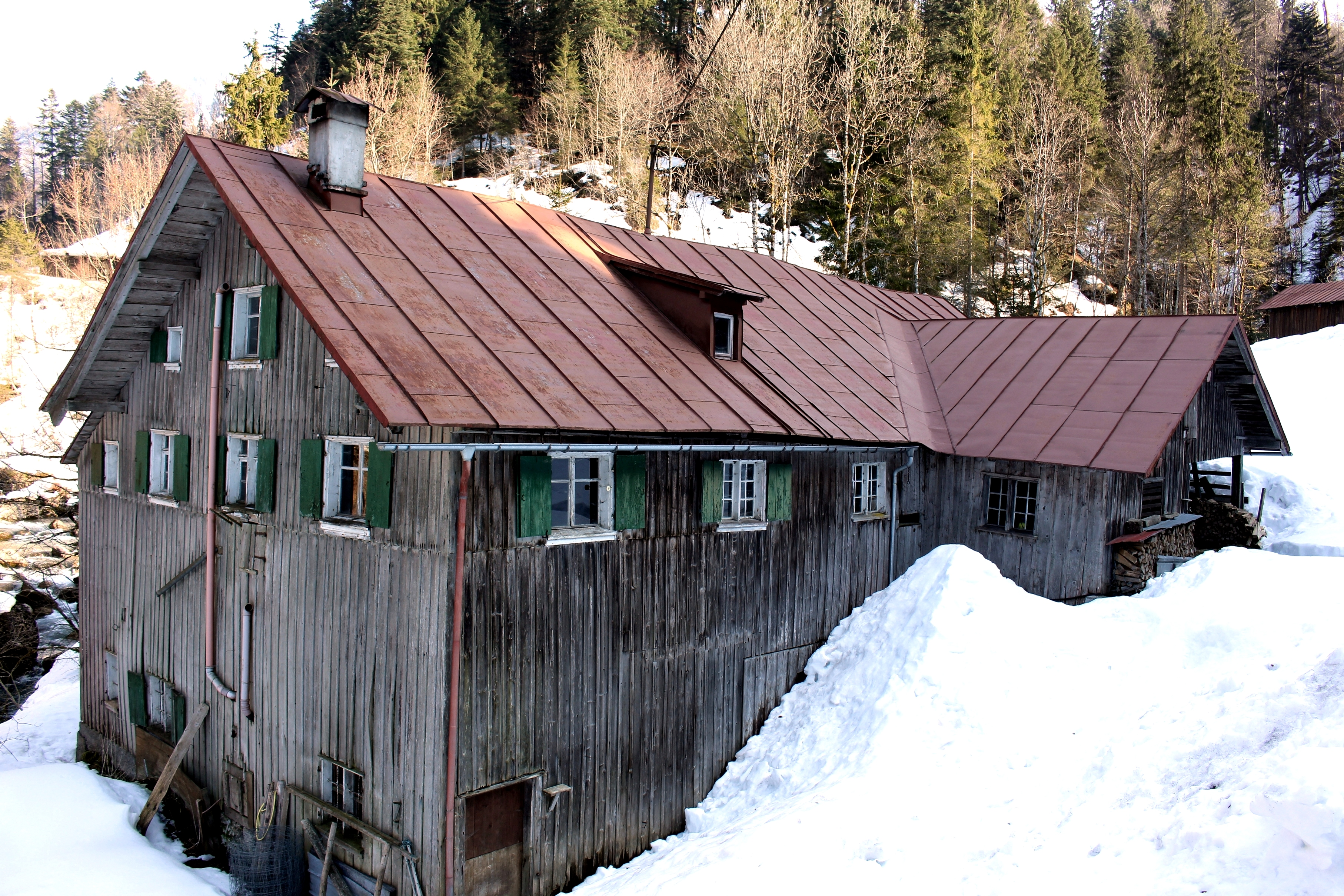 Oberstaufen, OT Steibis, Lanzenbach 1, Lanzenbachsäge. Das ehemalige Sägewerk, ein zweigeschossiger, verschalter Blockbau mit Satteldach und oberschlächtigem Wasserrad, stammt aus der ersten Hälfte des 19. Jahrhunderts.